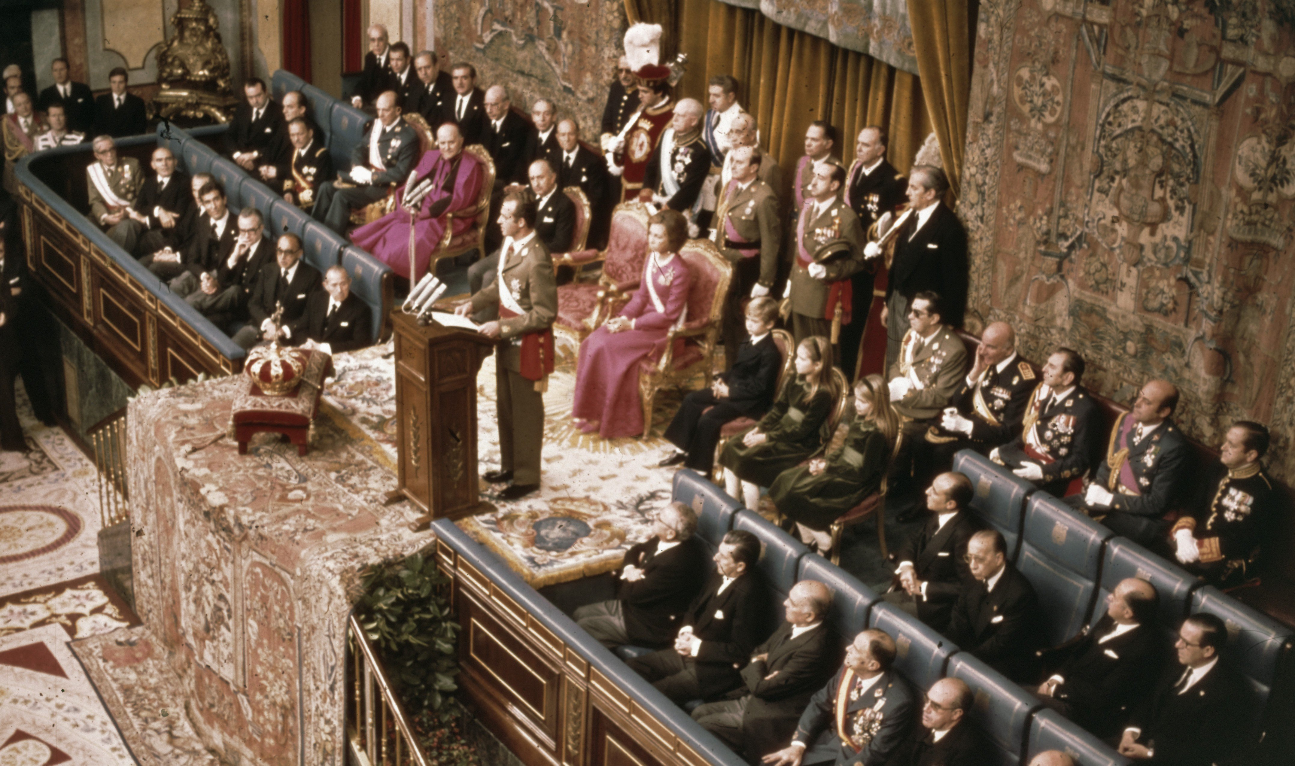 Collectie / Archief : Fotocollectie Anefo Reportage / Serie : [ onbekend ] Beschrijving : De proclamatie en beëdiging van Prins Juan Carlos tot Koning van Spanje tijdens een speciale zitting van de Cortes, het Spaanse parlement, op 22 november 1975. Juan Carlos spreekt de Cortes toe. Datum : 22 november 1975 Locatie : Madrid Trefwoorden : Generaals, Prinsen Persoonsnaam : Juan Carlos, prins van Spanje Fotograaf : [onbekend] Auteursrechthebbende : Nationaal Archief Materiaalsoort : Dia (kleur) Nummer archiefinventaris : bekijk toegang 2.24.01.07 Bestanddeelnummer : 254-9763